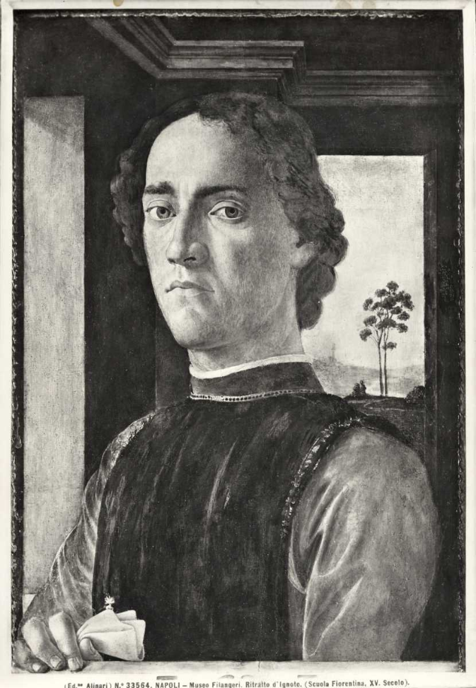 "Retrato de un hombre", de Sandro Botticelli. Obra de hacia 1475-1480. El cuadro pertenecía al Museo Civico Gaetano Filangieri de Nápoles (Italia) y quedó destruida en 1943, durante la Segunda Guerra Mundial. - Tempera sobre tabla - Fotografía tomada por los hermanos Alinari antes de 1928 (consta ya en su católogo de ese año (Catalogo Alinari "Campania I. Napoli" 1928, p. 30)